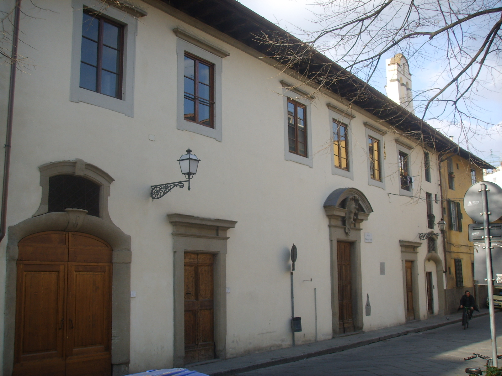 Chiesa_e_convento_di_San_Salvatore_a_Camaldoli in Piazza Tasso (Firenze)